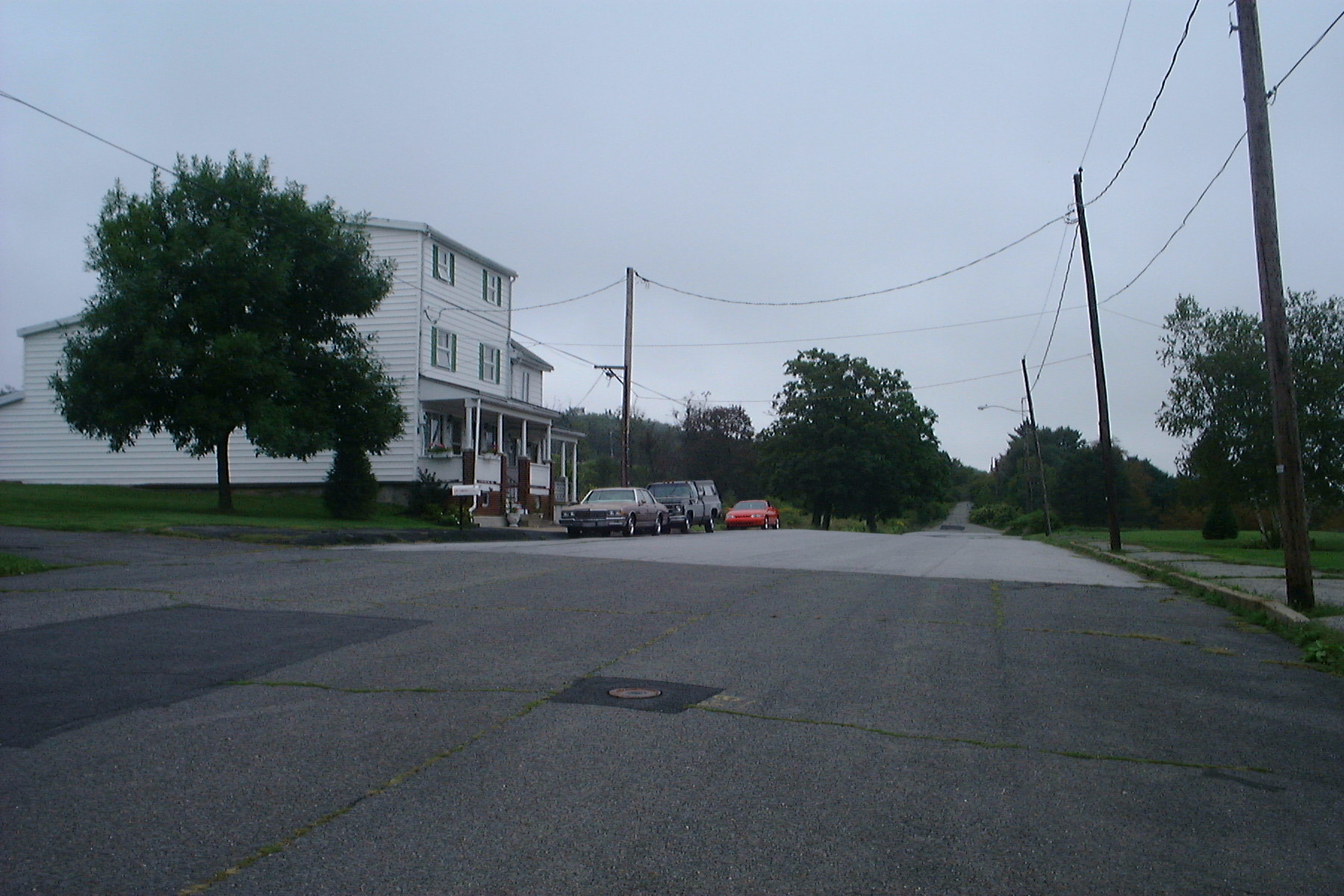 Unas de las pocas construcciones restantes de la ciudad de Centralia, Pennsylvania.